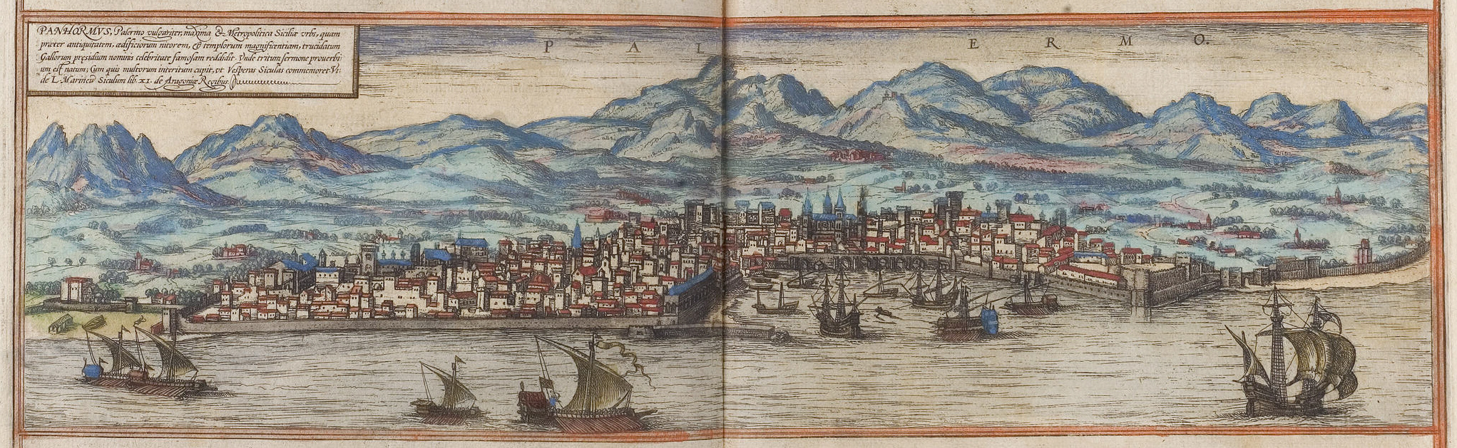 Palermo